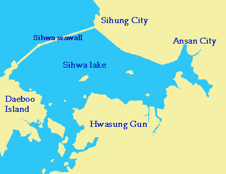 Сихвинская ПЭС